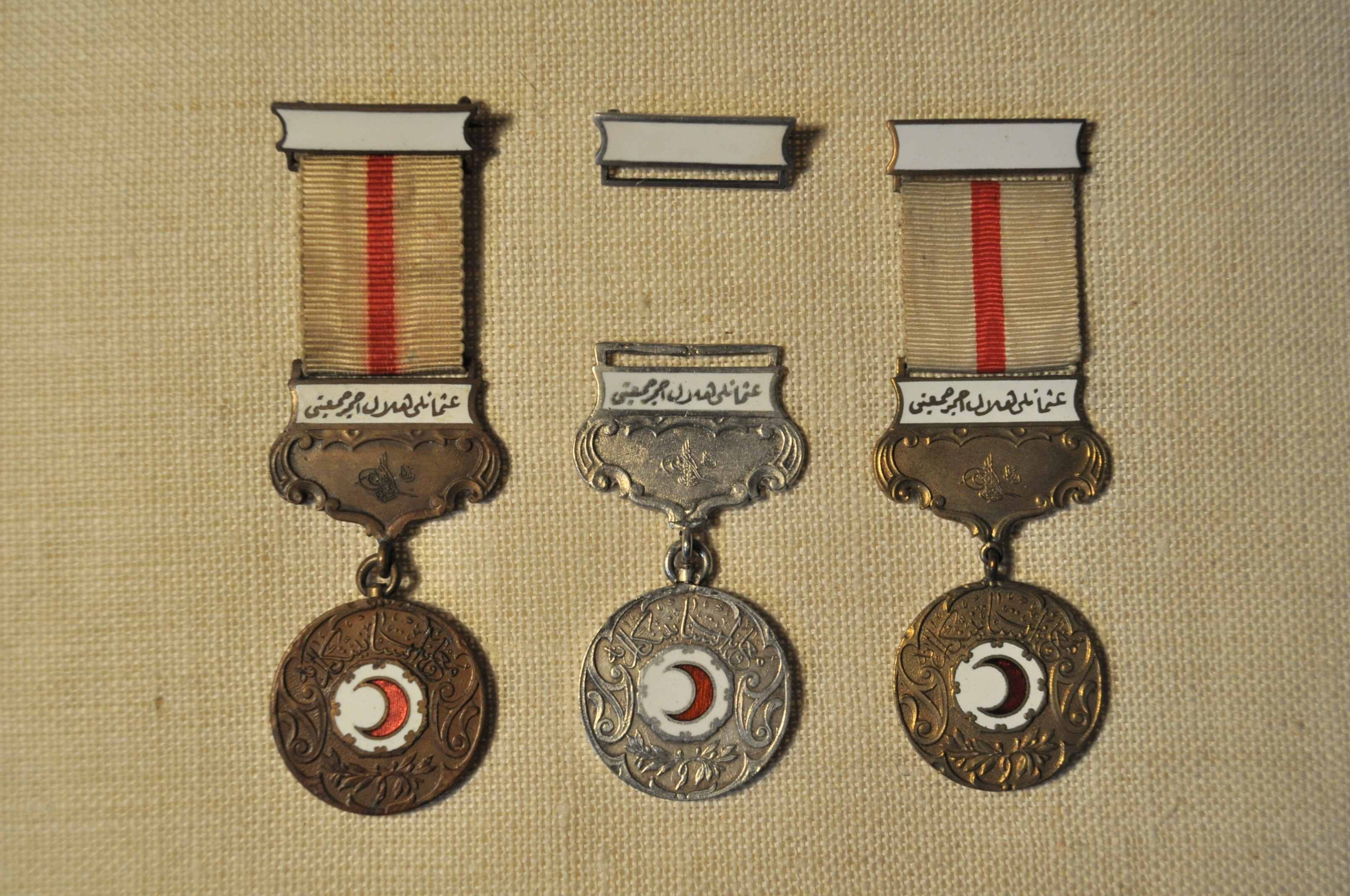 Verdienstmedaillen vom Roten Halbmond in Bronze, Silber und Gold (vlnr) Vorderseite.